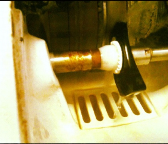 lavorazione di una lente organica con una mola automatica